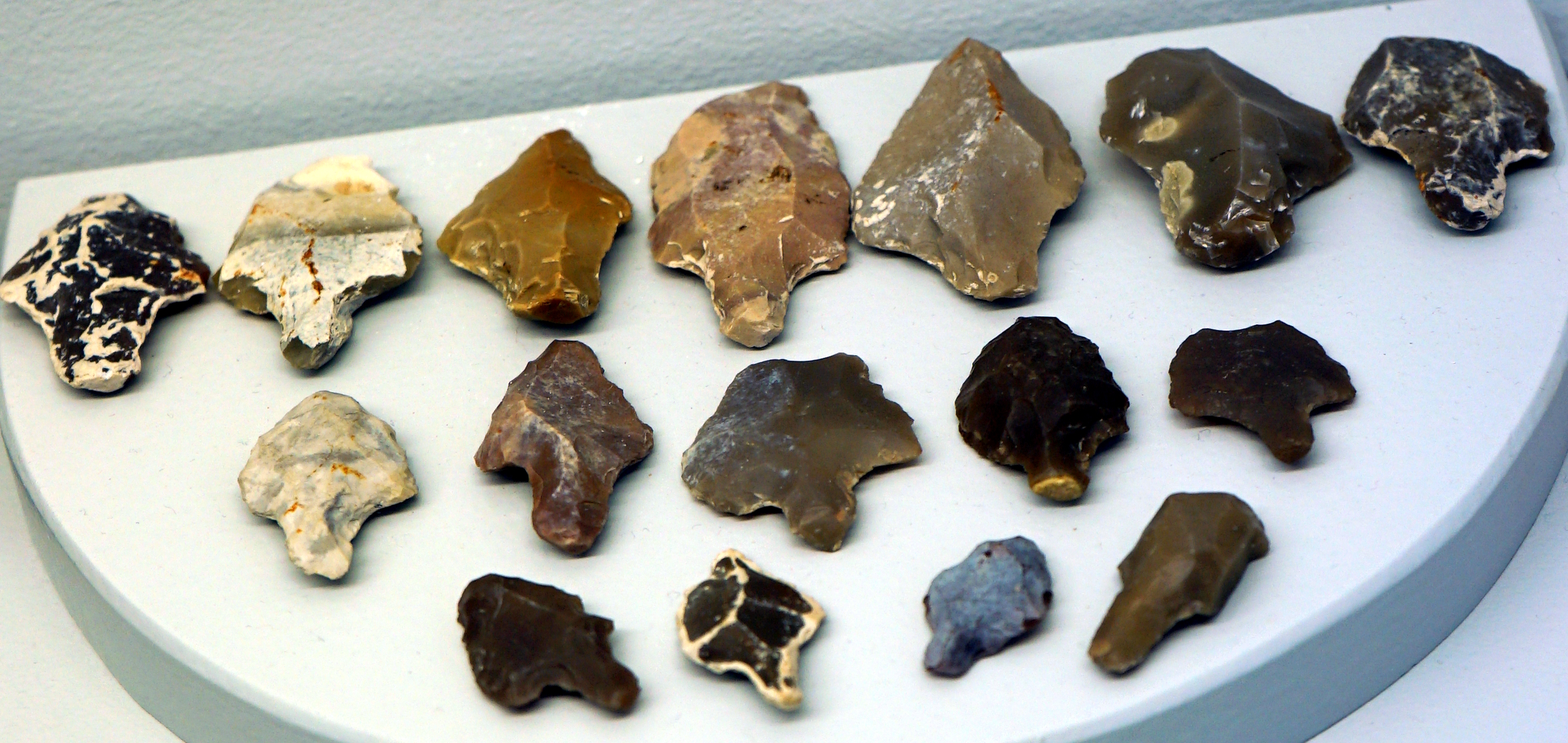 présenté au musée de Toul.